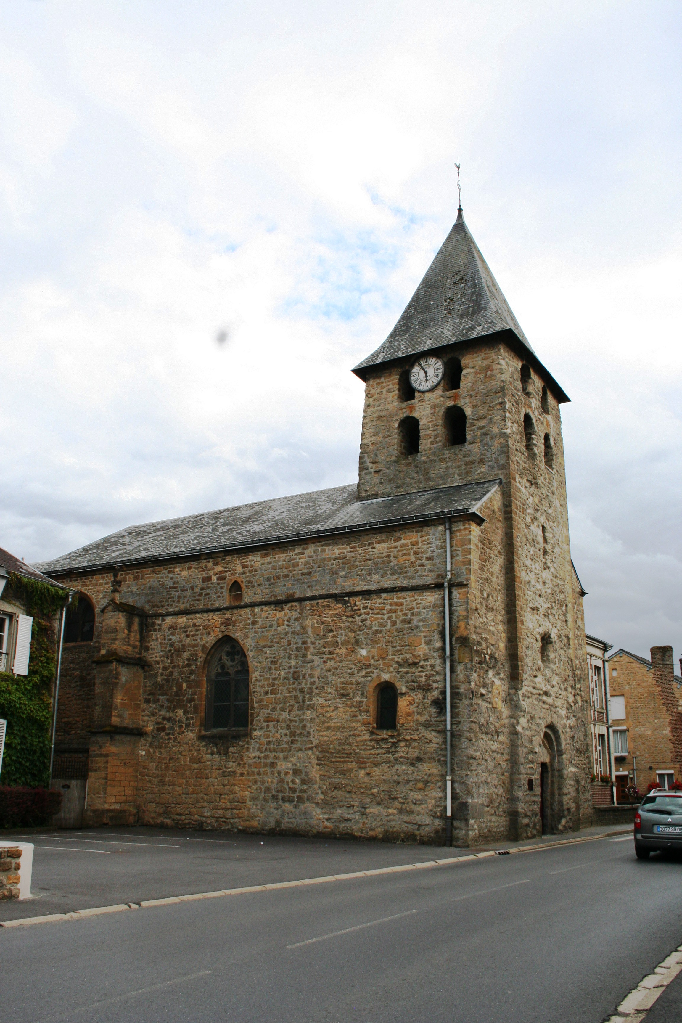 Église Saint-Jean-Baptiste de Warcq (Ardennes, France) .